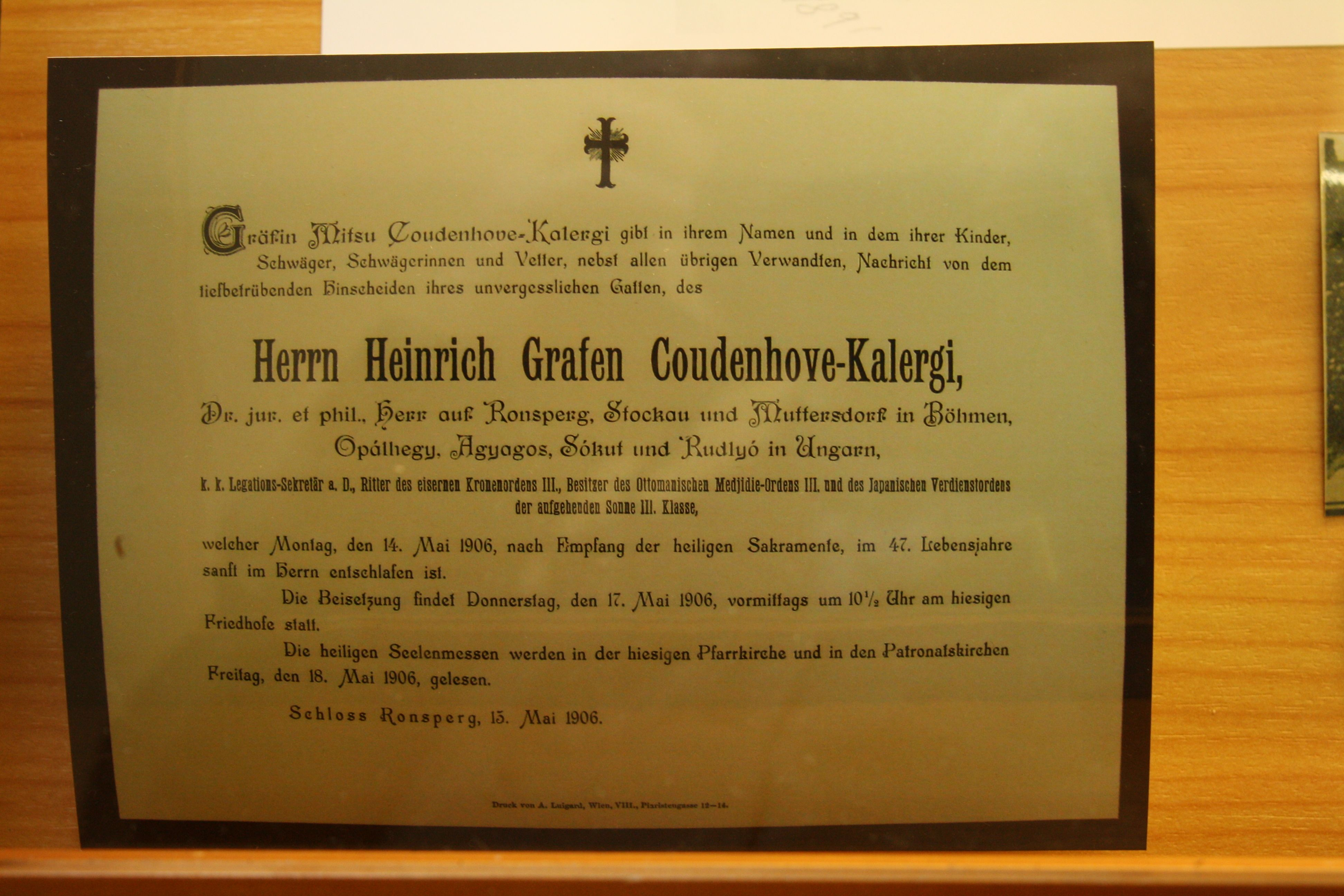 Todesanzeige von Heinrich Graf von Coudenhove-Kalergi im Heimatmuseum Mödling